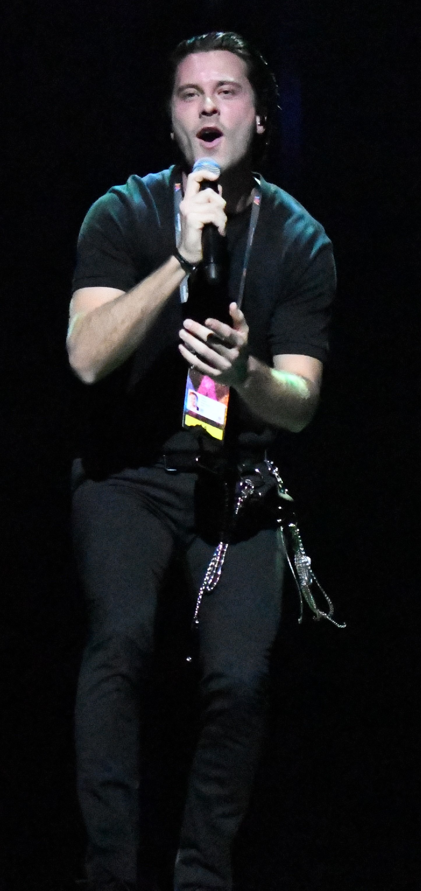 Melodifestivalen 2020, Malmö, Deltävling 4, Repetition fredag, Melodi nr 4 Troubled Waters, Victor Crone